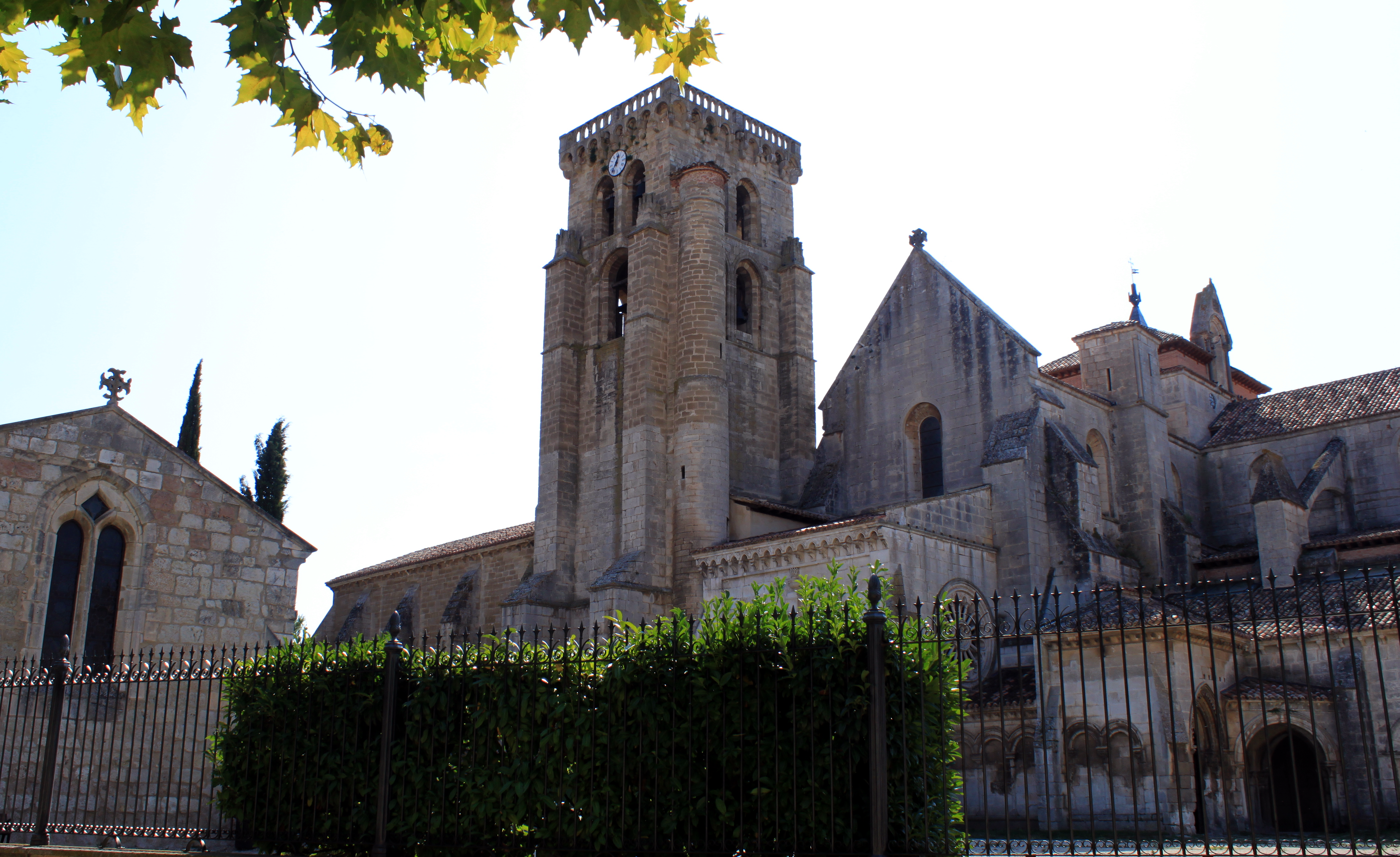 Real Monasterio de las Huelgas (Burgos)